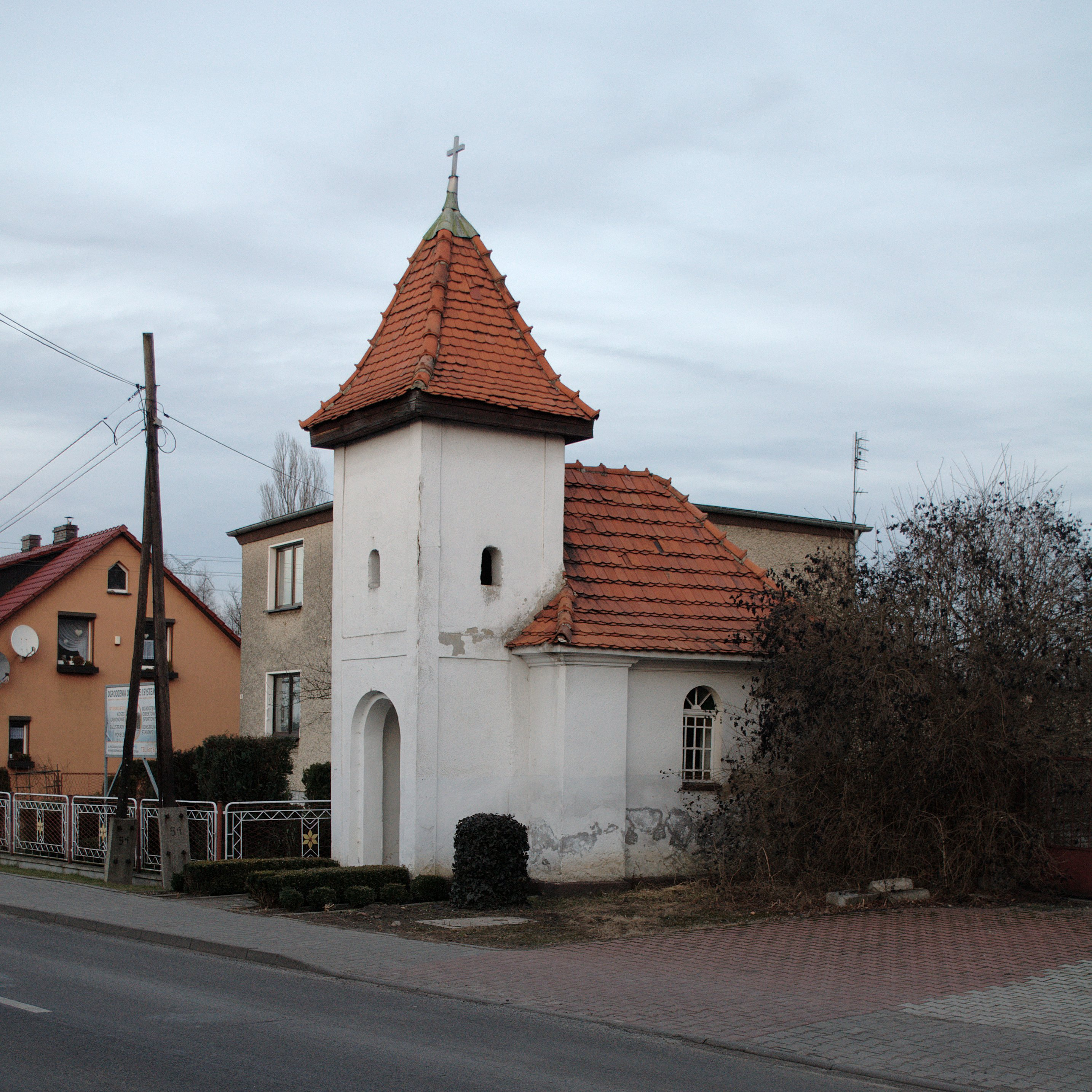 Taciszów. Ulica Gliwicka. Kapliczka.